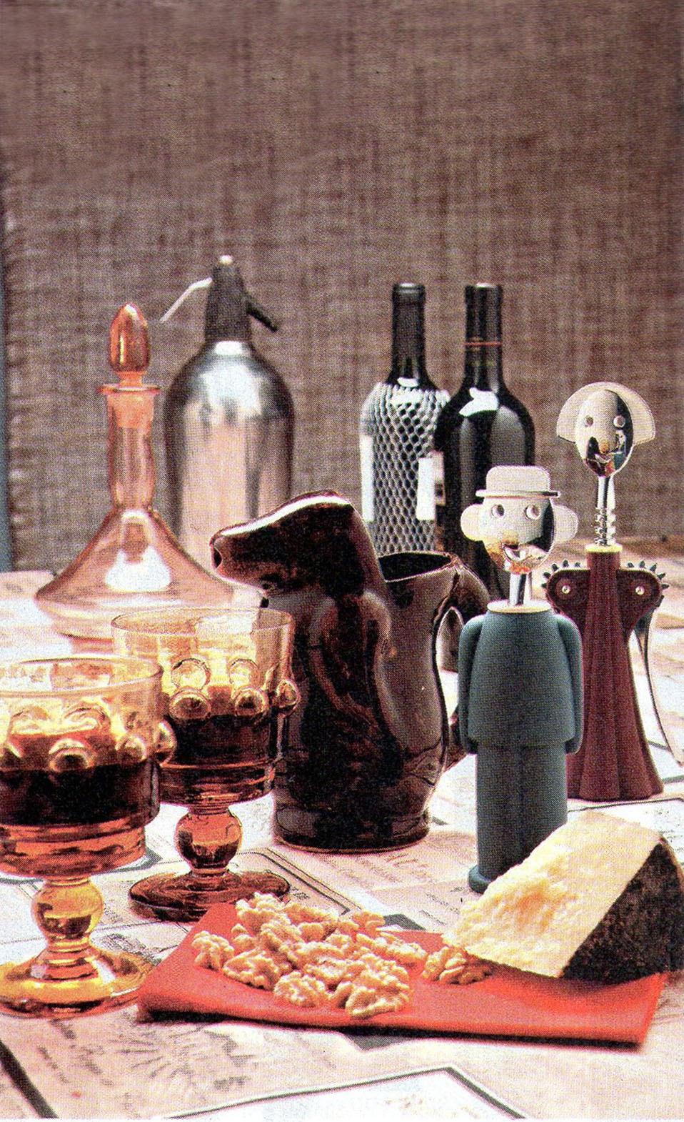 Fuente: Revista Viva 27/11/2011